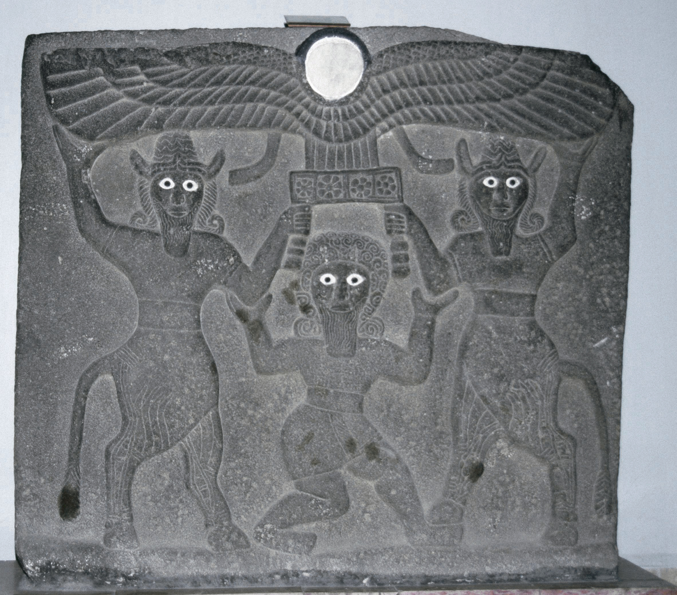 Nationalmuseum Aleppo, Relief aus Tell Halaf, Gilgamesch zwischen 2 Stiermenschen, assyrisch